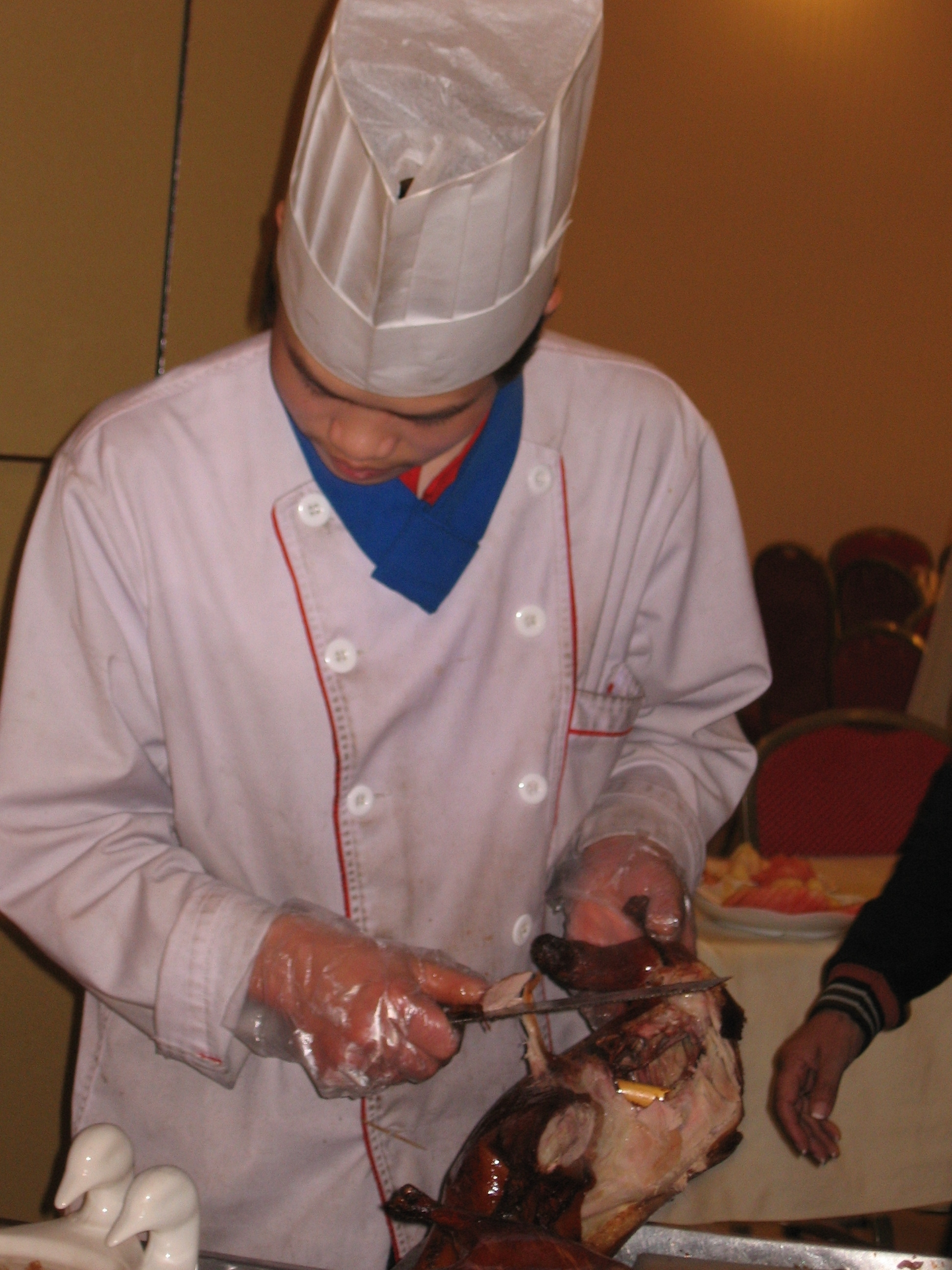 Preparing Peking duck in China